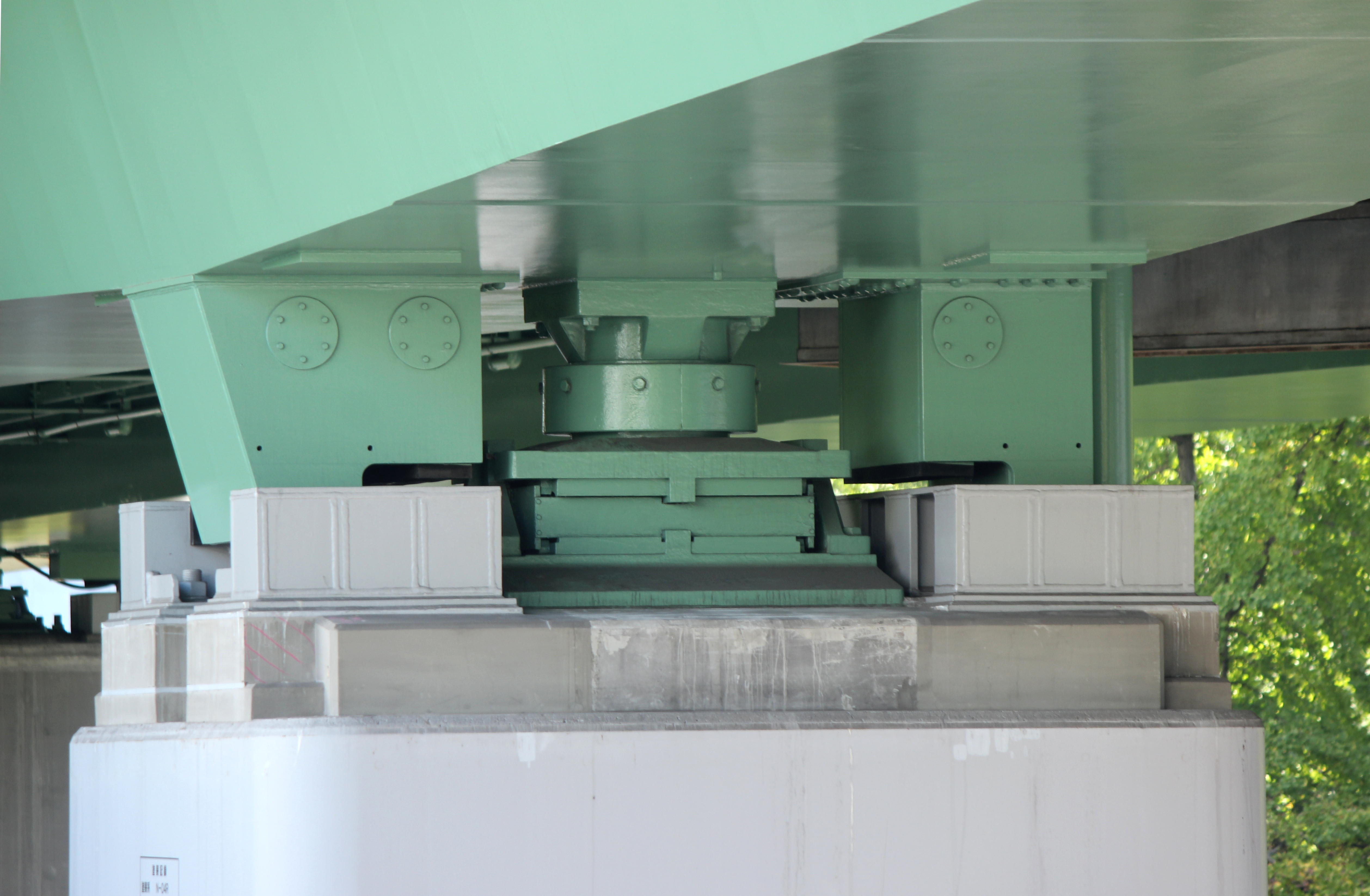 高架橋の支承